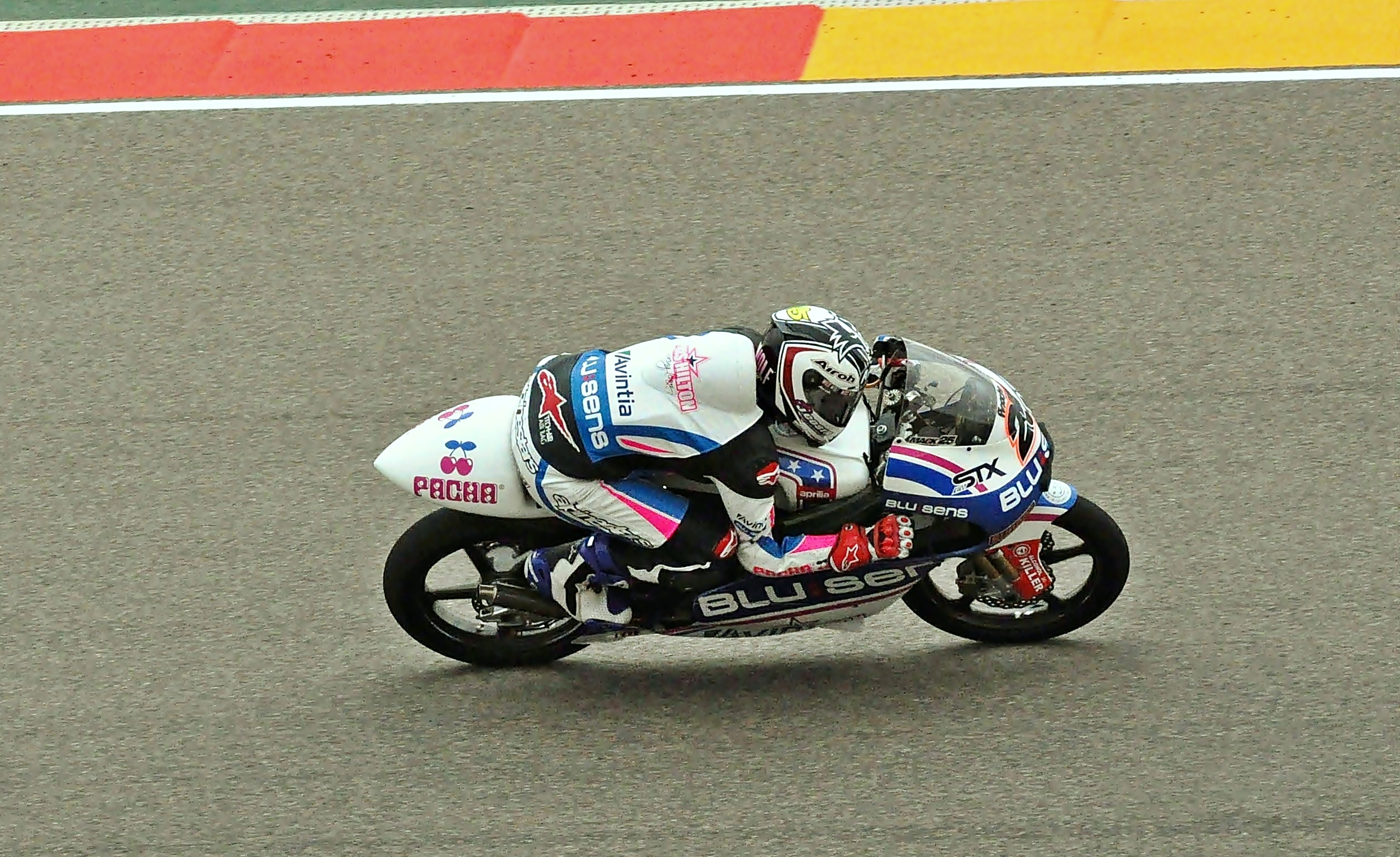 Viñales motorland 2011